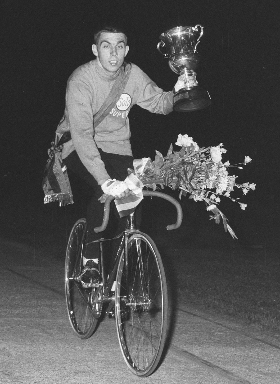 Collectie / Archief : Fotocollectie Anefo Reportage / Serie : [ onbekend ] Beschrijving : Patrick Sercu wint Piet Moeskopsbeker, Patrick Sercu rijdt ereronde Datum : 24 juni 1965 Trefwoorden : bekers, ererondes, wielrennen Persoonsnaam : Sercu, Patrick Fotograaf : Nijs, Jac. de / Anefo Auteursrechthebbende : Nationaal Archief Materiaalsoort : Negatief (zwart/wit) Nummer archiefinventaris : bekijk toegang 2.24.01.03 Bestanddeelnummer : 917-9002